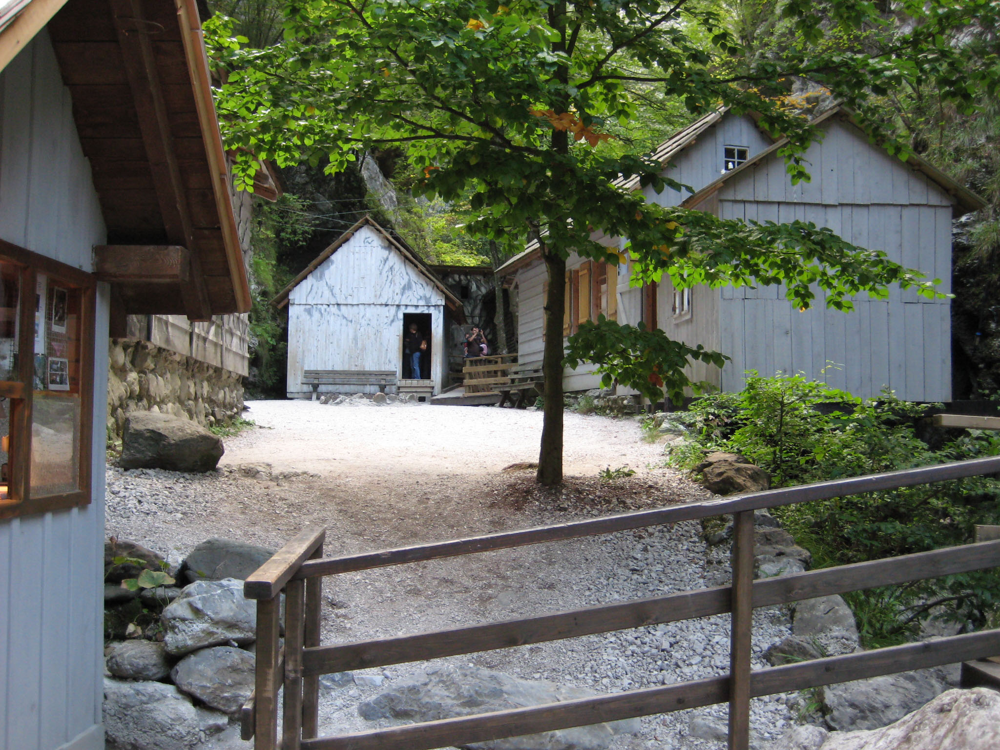 Partisan Hospital Franja